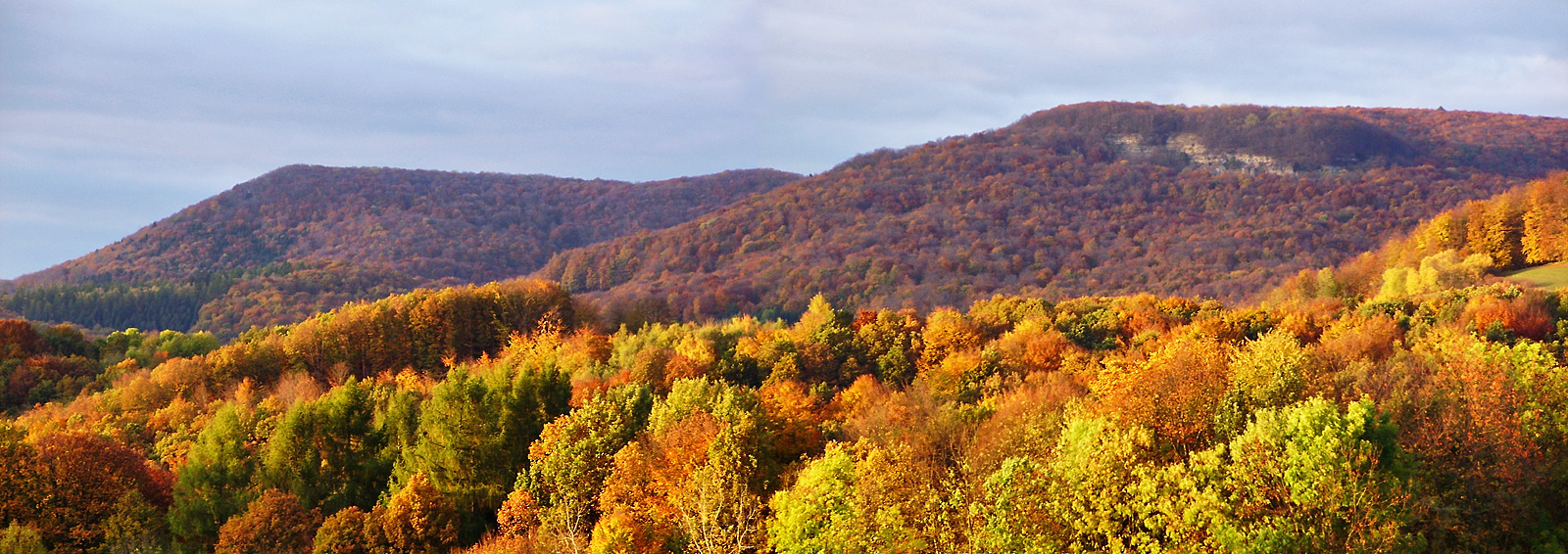 Hessische Schweiz im Oktober 2008, links die Hörne-Kuppe